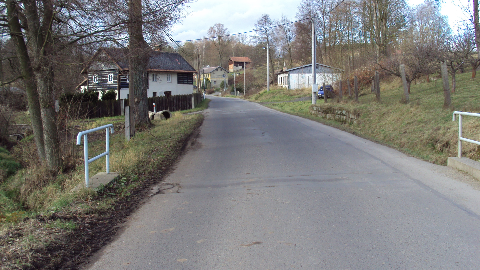 Kamenice u Zákup, začátek připojené obce. Silnice III/26834.